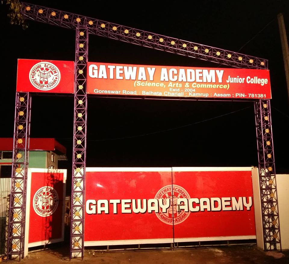 অসমীয়া: গেটৱে একাডেমী কনিষ্ঠ মহাবিদ্যালয়ৰ মুখ্য প্ৰৱেশদ্বাৰ